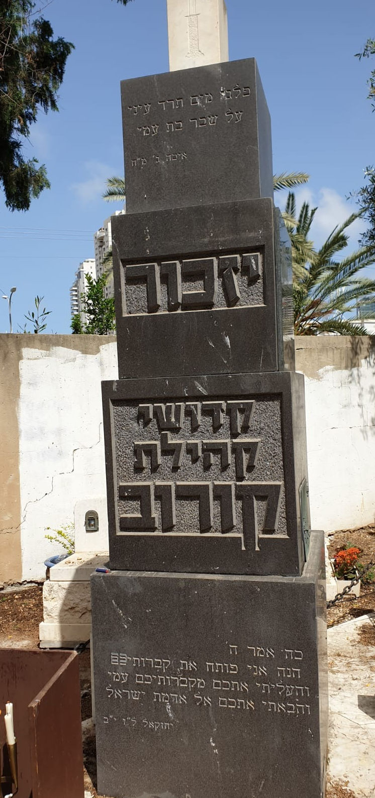 האנדרטה בבית הקברות נחלת יצחק, גבעתיים